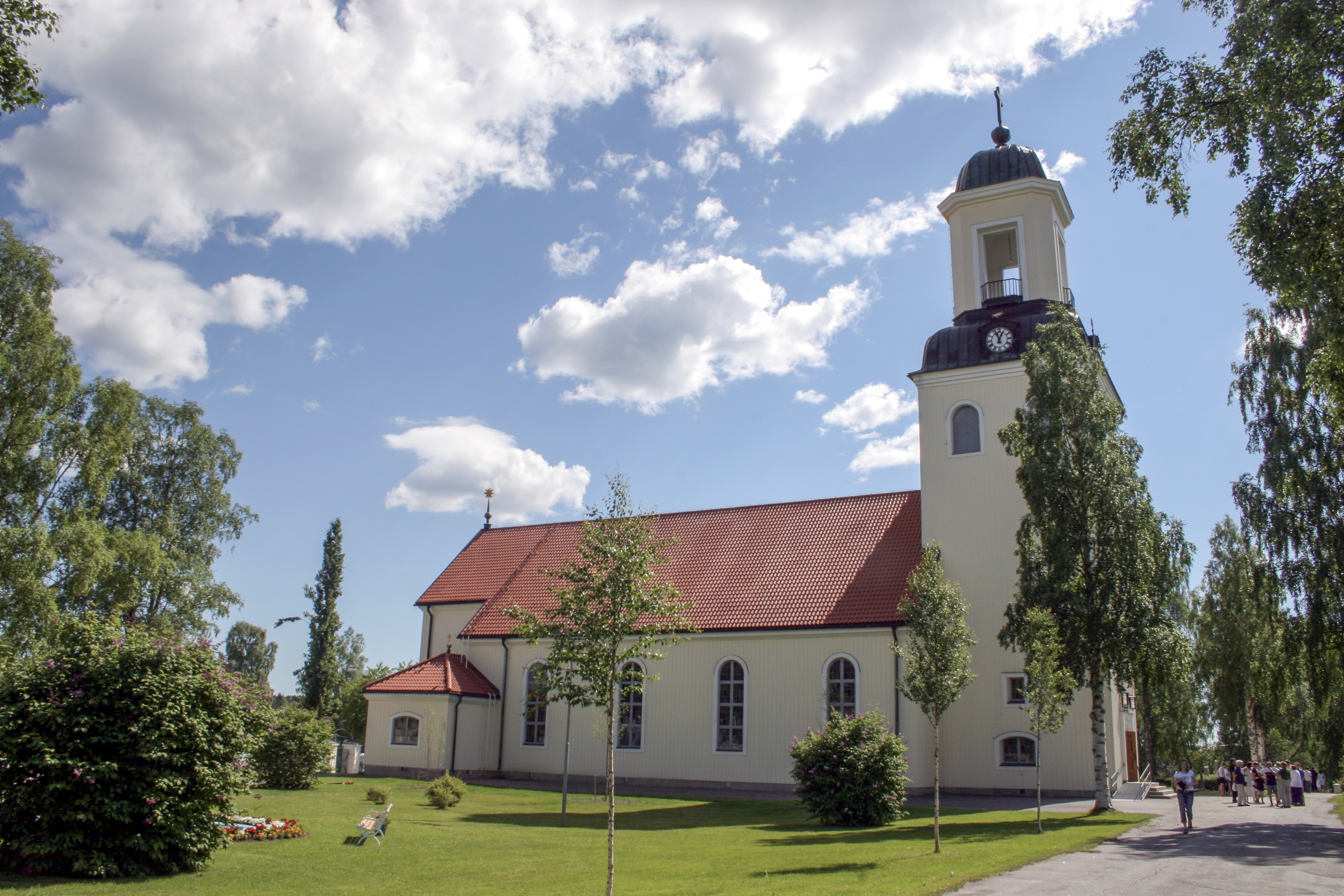 Bjurholms kyrka, Västerbotten, Sweden.